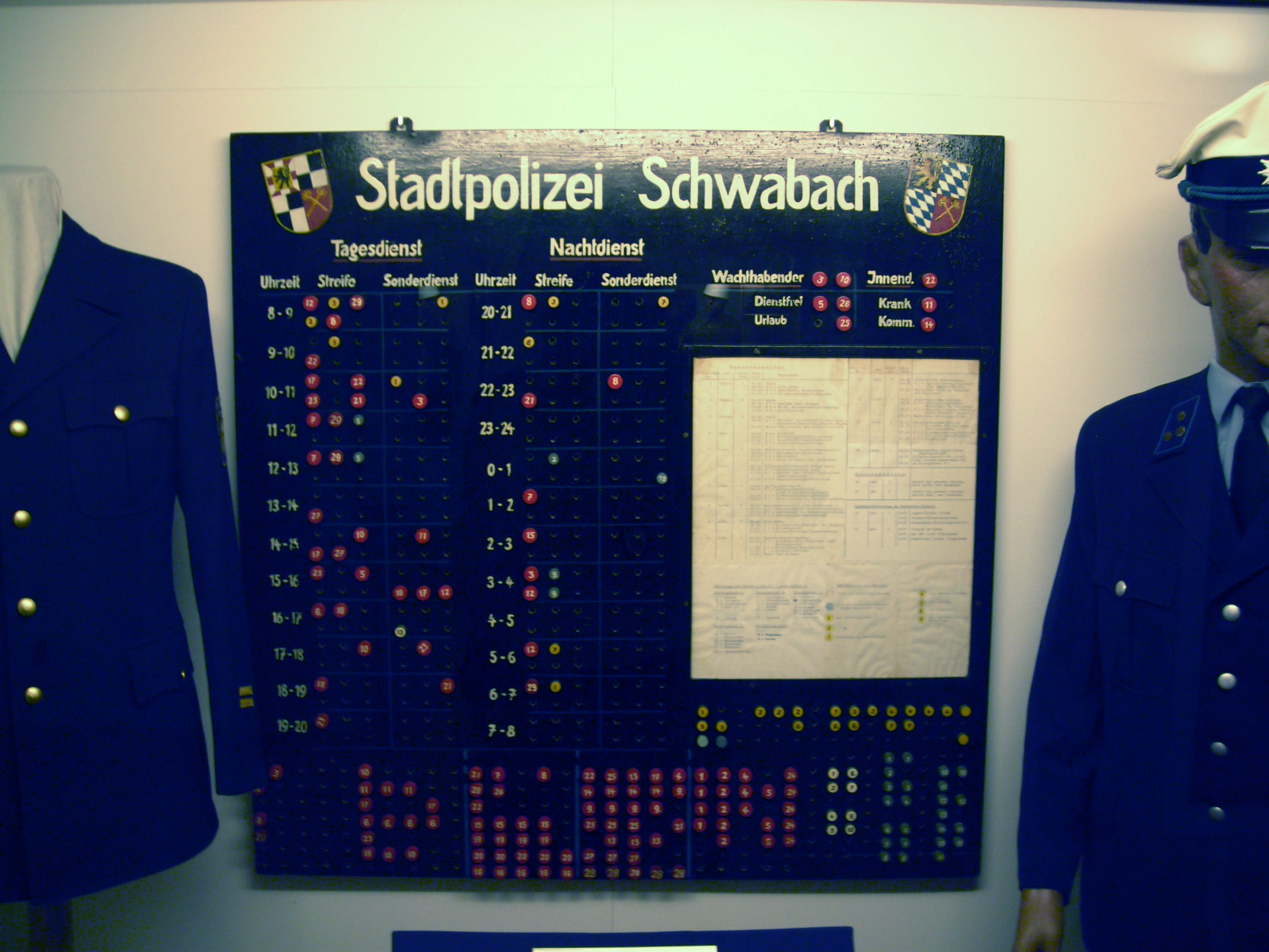 Dienstplan der Stadtpolizei Schwabach (vor 1970), Exponat der Sonderausstellung 60 Jahre Bayerische Polizei (Ingolstadt.)